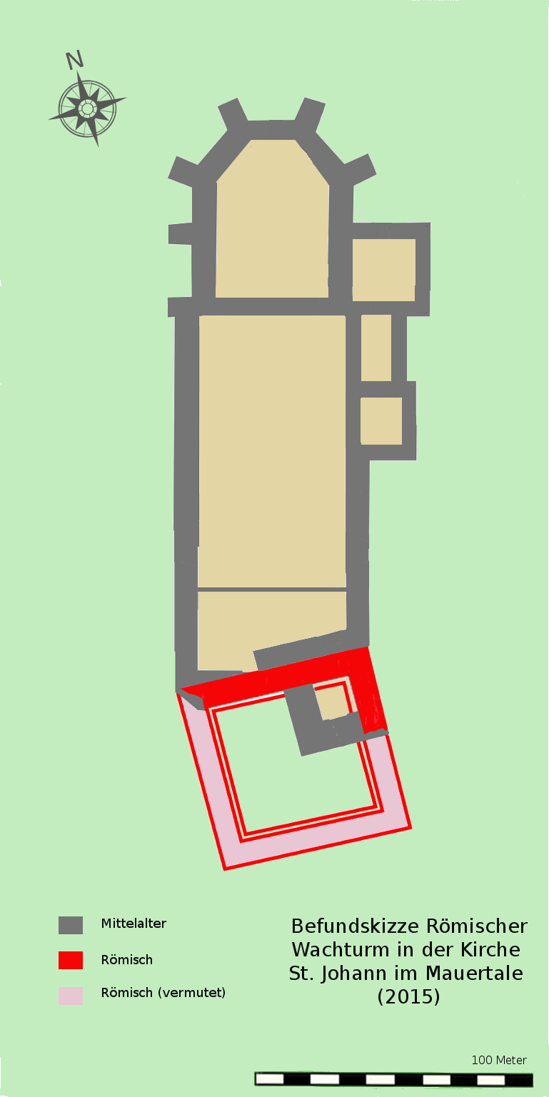 Befundskizze (2015) des mutmaßlichen römischen Wachturms in der Kirche St. Johann im Mauertale, Österreich.